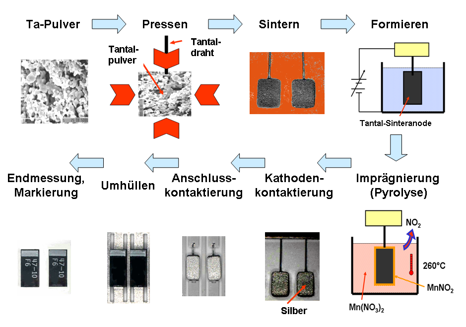 Fertigungsprozess zur Herstellung von Tantal-Elektrolytkondenstoren mit Sinteranode